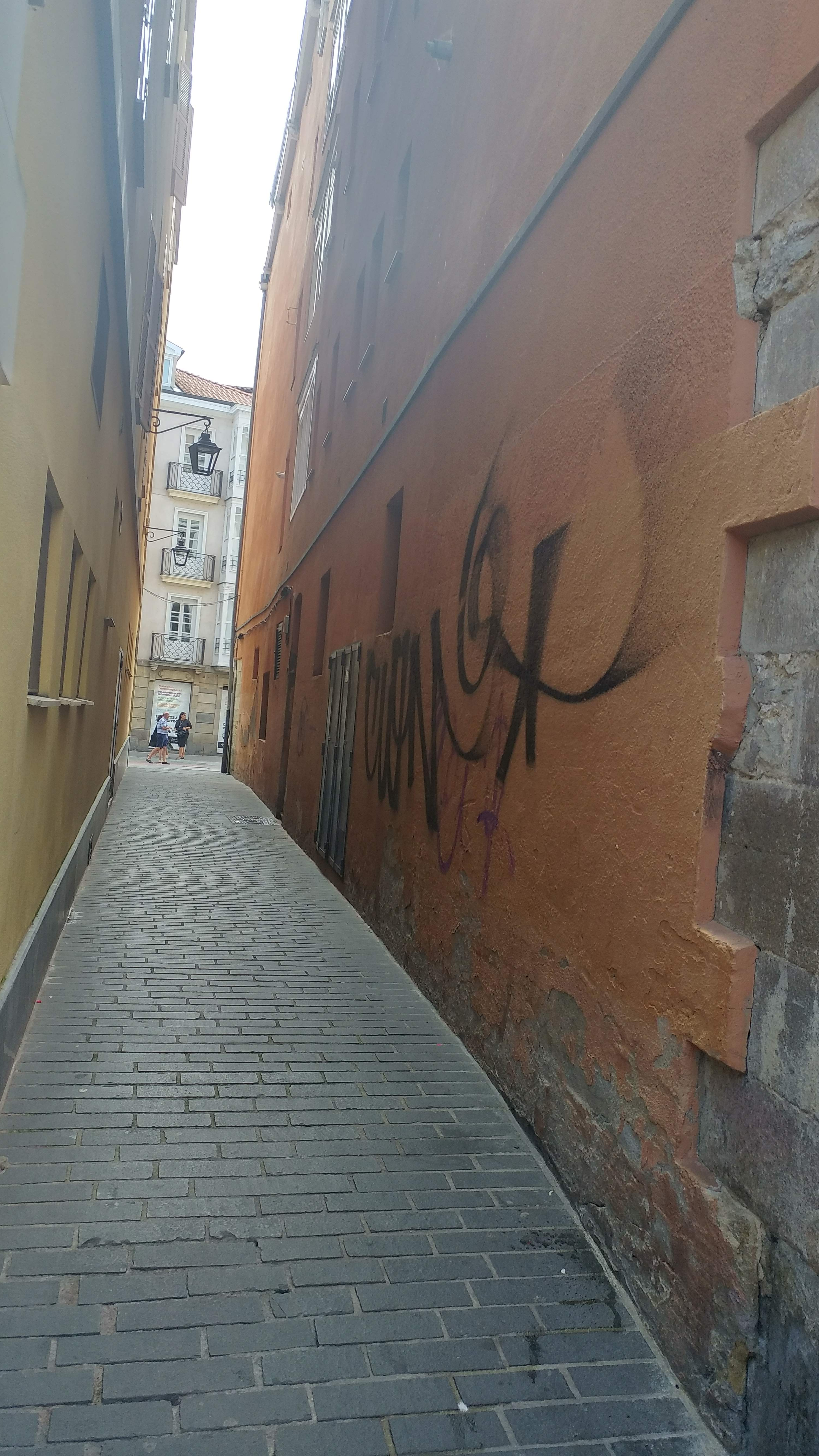 Gasteizko Alde Zaharreko kantoi estua.